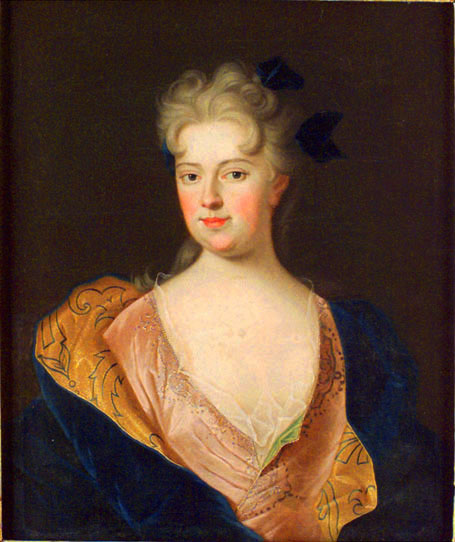 Madame Anna Potocki Palatine de Chiovie (Anna Leszczyńska (1699-1717)?